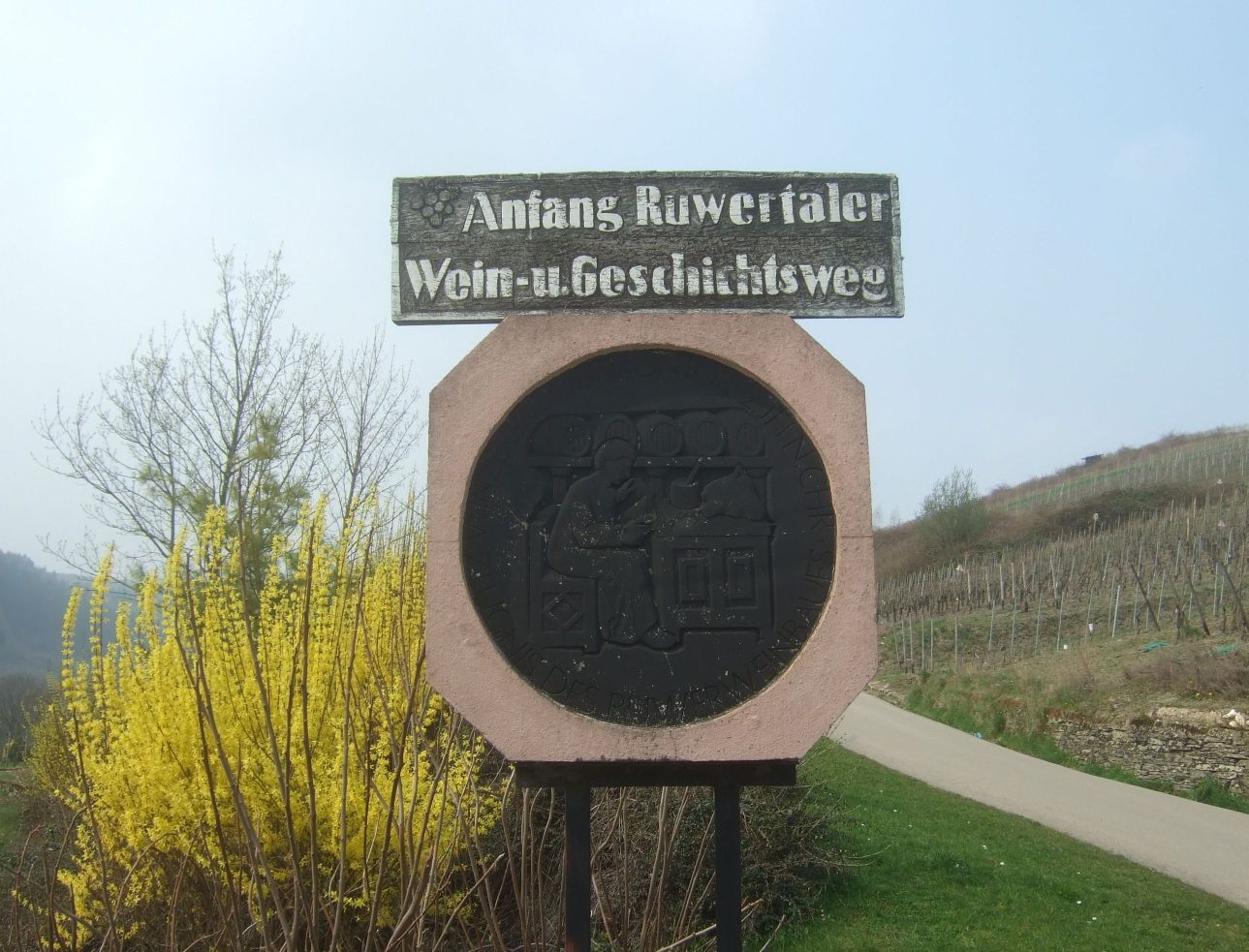 Hinweis auf den Ruwertaler Wein- und Geschichtsweg in Waldrach/Ruwertal